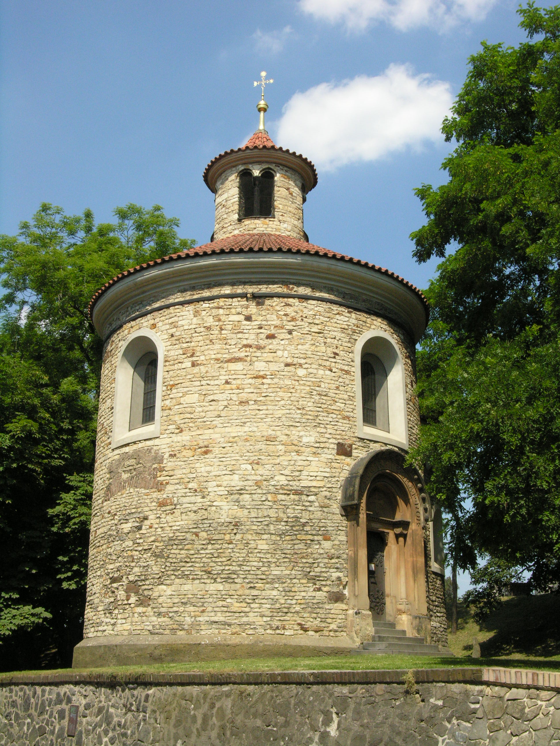 Pevnost Vyšehrad, Praha 2-Vyšehrad, Soběslavova 14/1, V pevnosti 16/2, 35/11, K rotundě 16/3, 81/6, 82/8, 90/12, 91/14, 92/16, 100/10, Štulcova 89/1, 102/2, 69/3